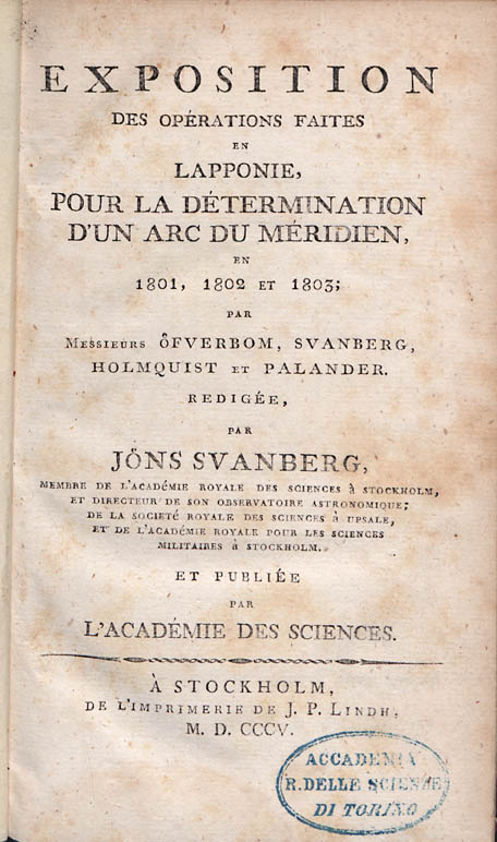 Frontespizio